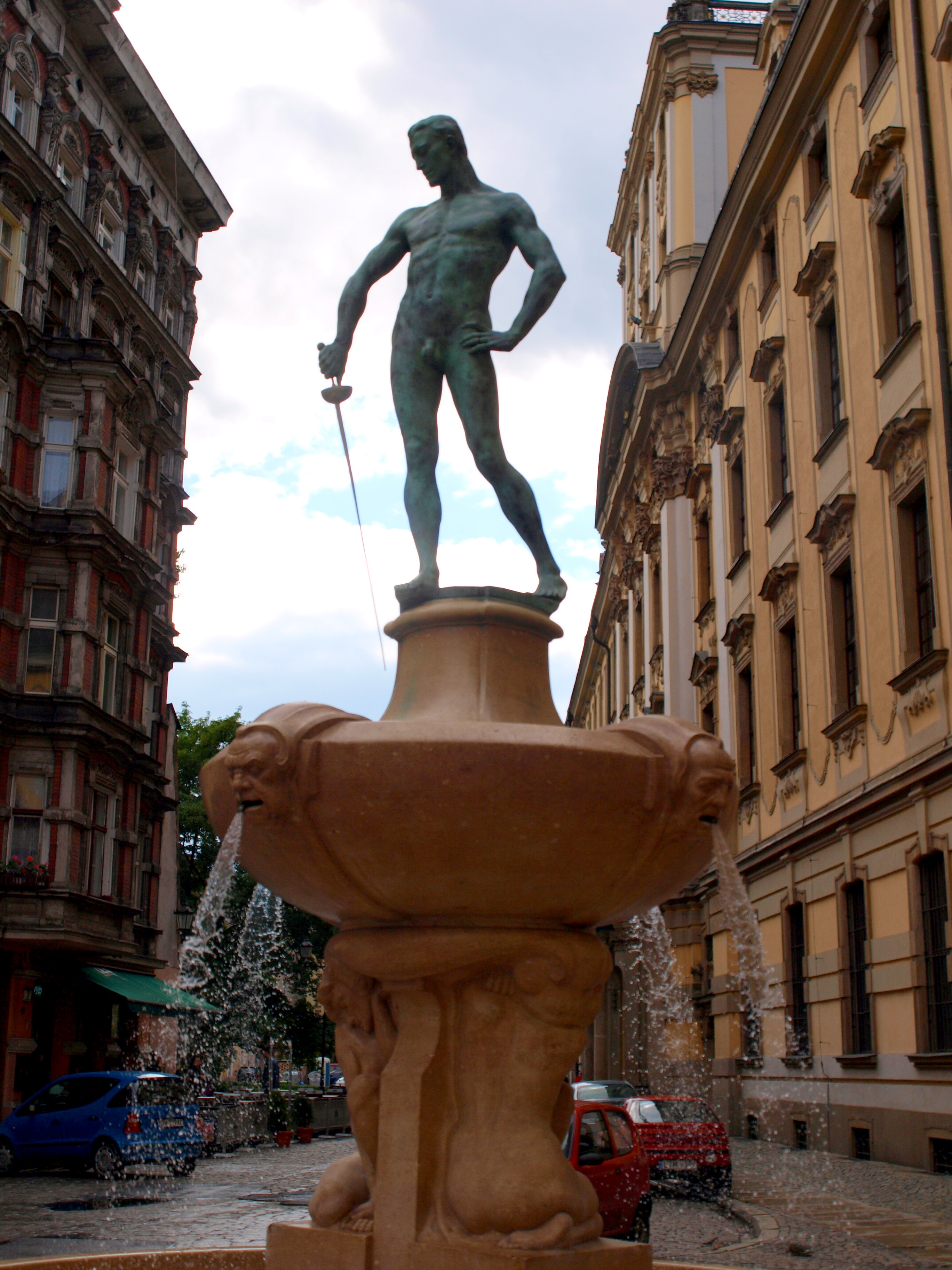 Fontanna Szermierz